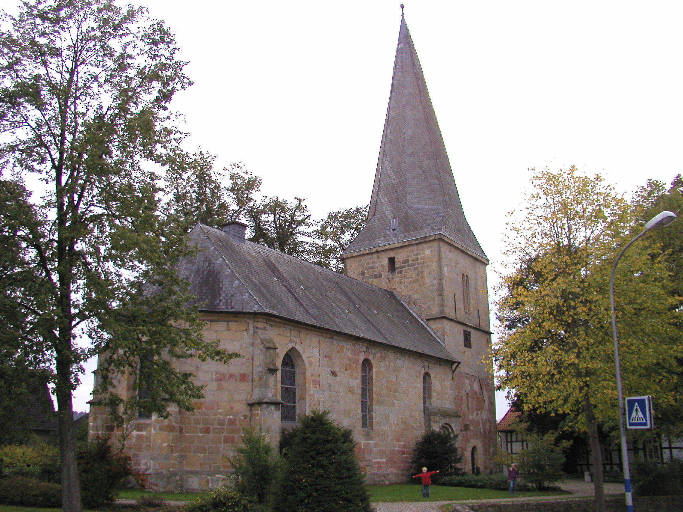 Evangelische Kirche in 49545 Tecklenburg-Ledde [1] This is a photograph of an architectural monument.